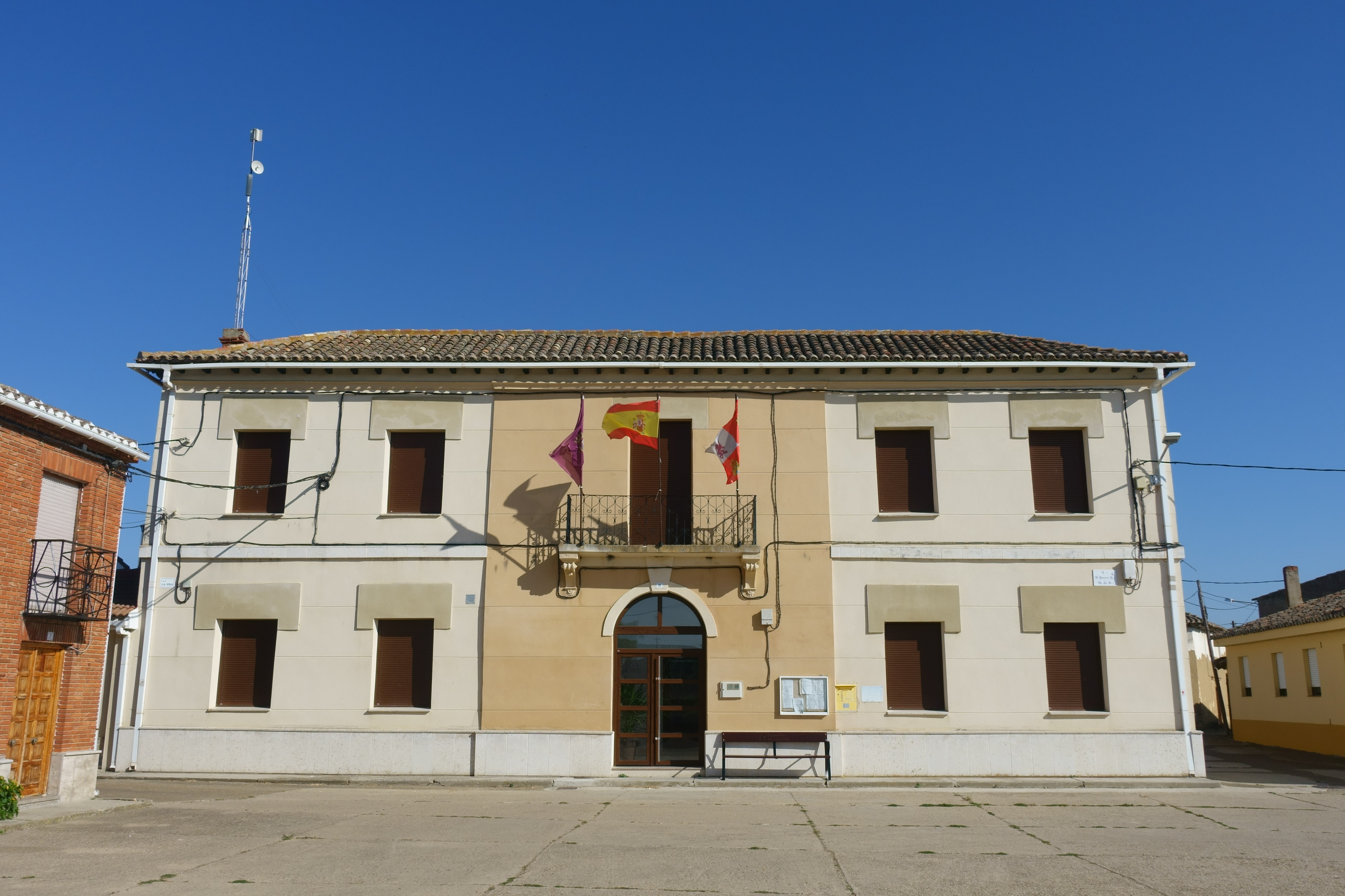 Casa consistorial de Villaturde (Palencia, España).